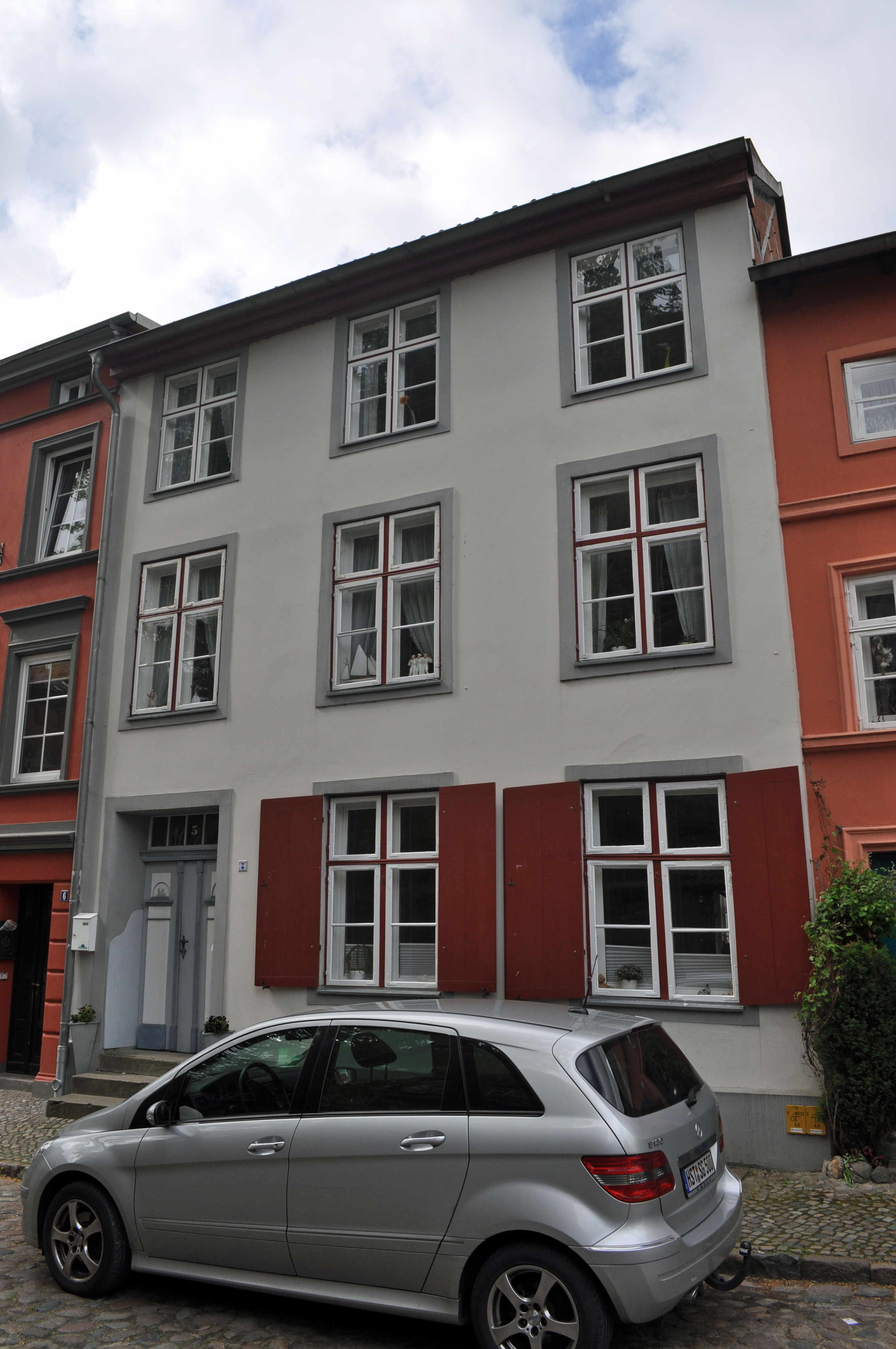 Gebäude in Stralsund, siehe Dateiname